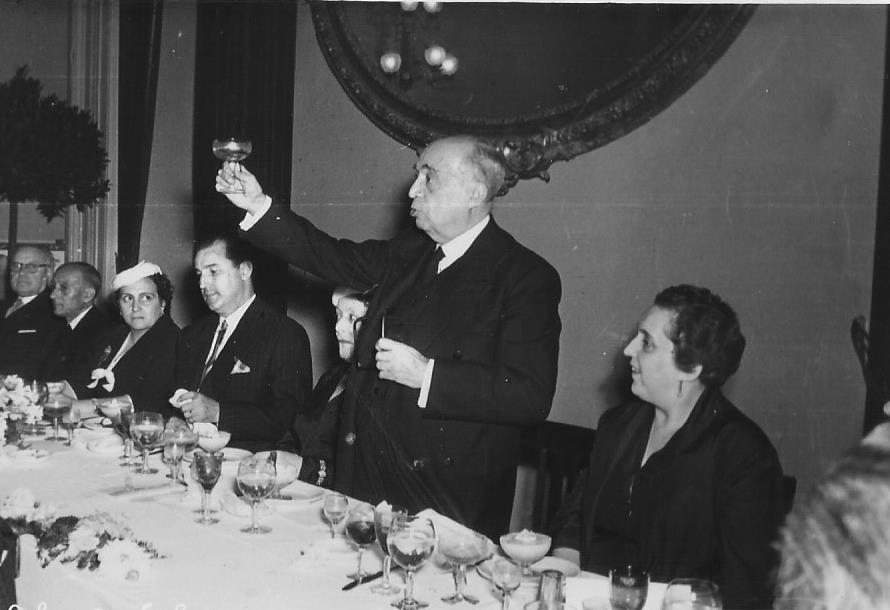 Brindis al "Círcol" de Jaume Gilabert Padreny